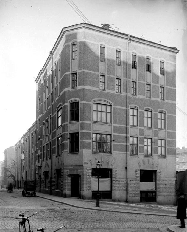 Percy F Lucks hus. Stormkransen 1. Tegnérgatan 20 B, Saltmatargatan 8 Byggnadsår 1902-03, Arkitekter Victor Bodin & Bror Almquist, byggherre Percy Lucks Handels AB, byggmästare J Heder.